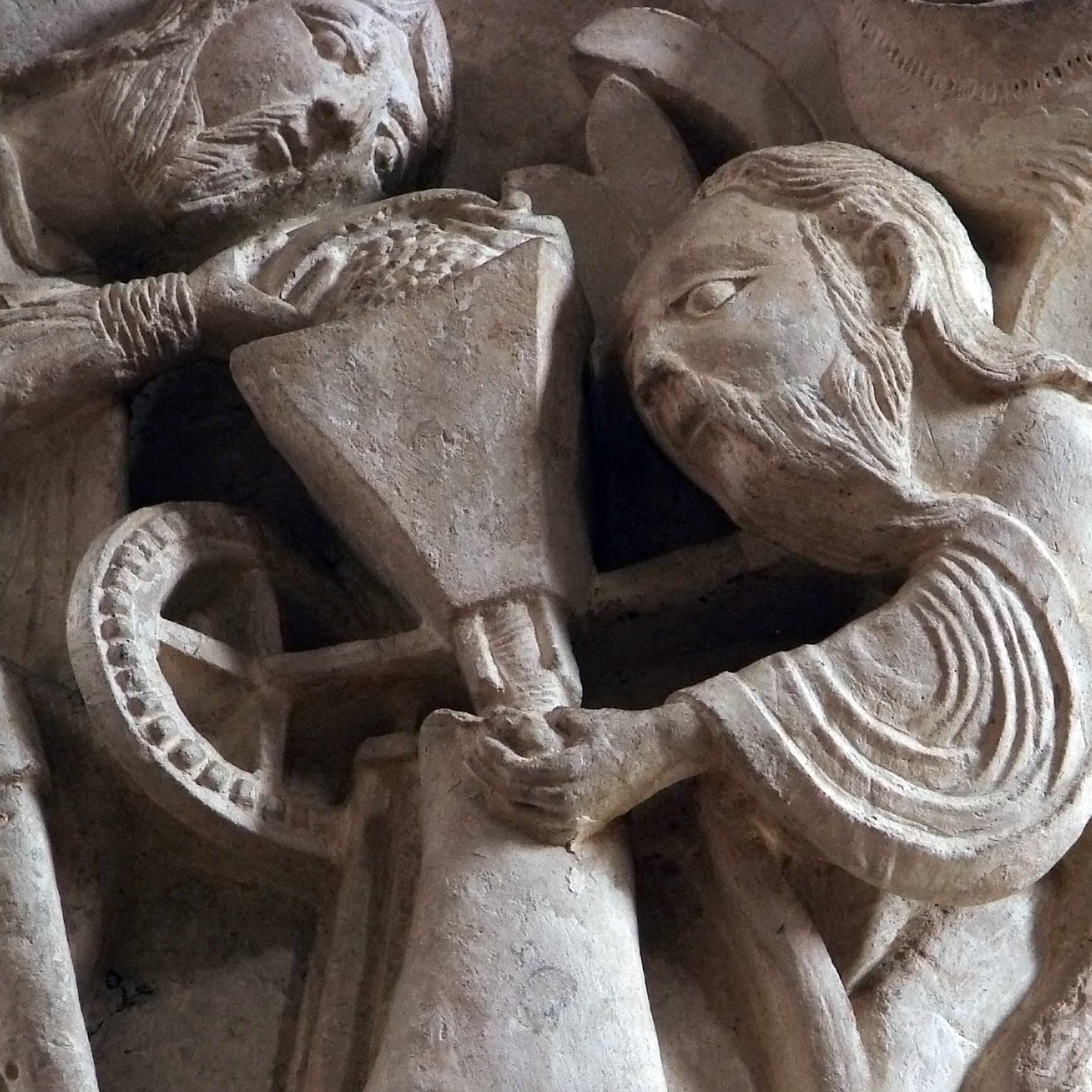 Chapiteau de la nef (2ème moitié du 12ème siècle), 4ème pile côté Sud: le Moulin Mystique, détail. Basilique Sainte-Marie-Madeleine de Vézelay.